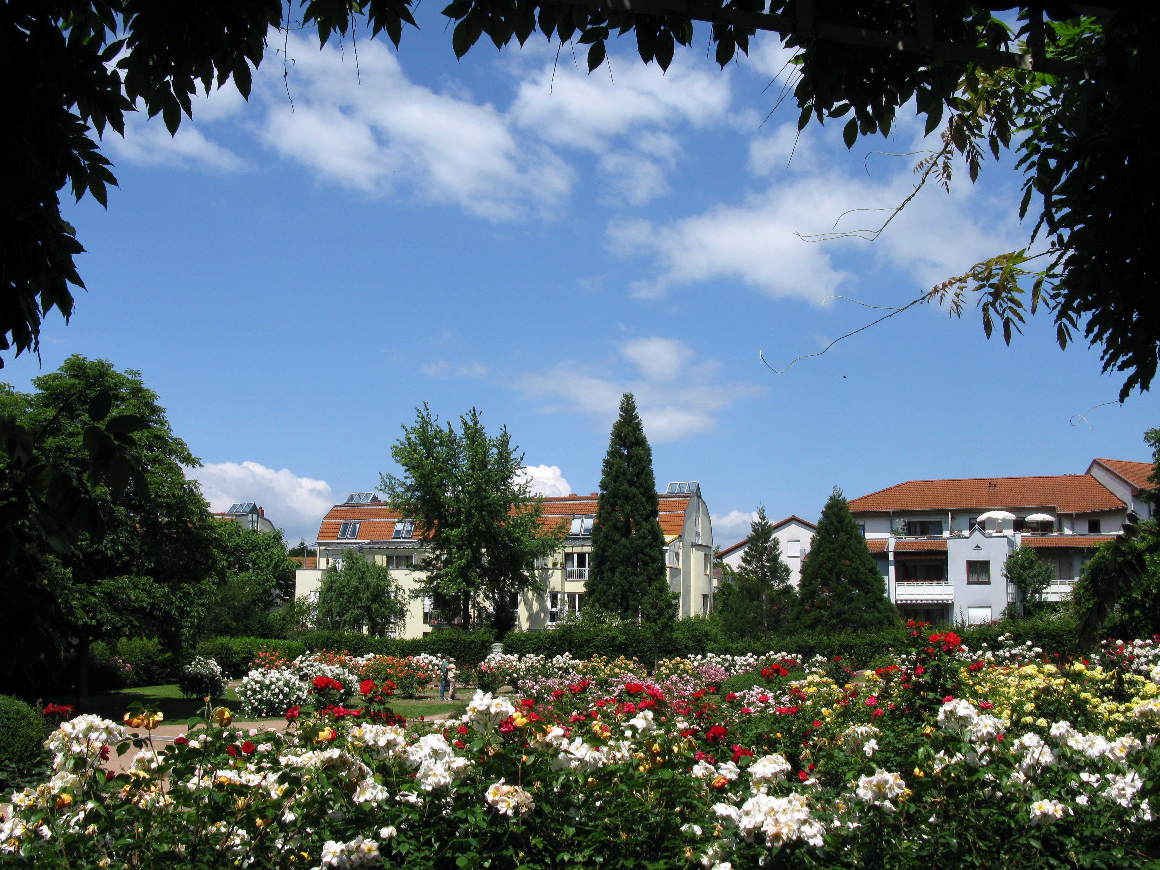 Nach Ehrenbürger Eugen Martin benannter Riosengarten im Seepark in Freiburg